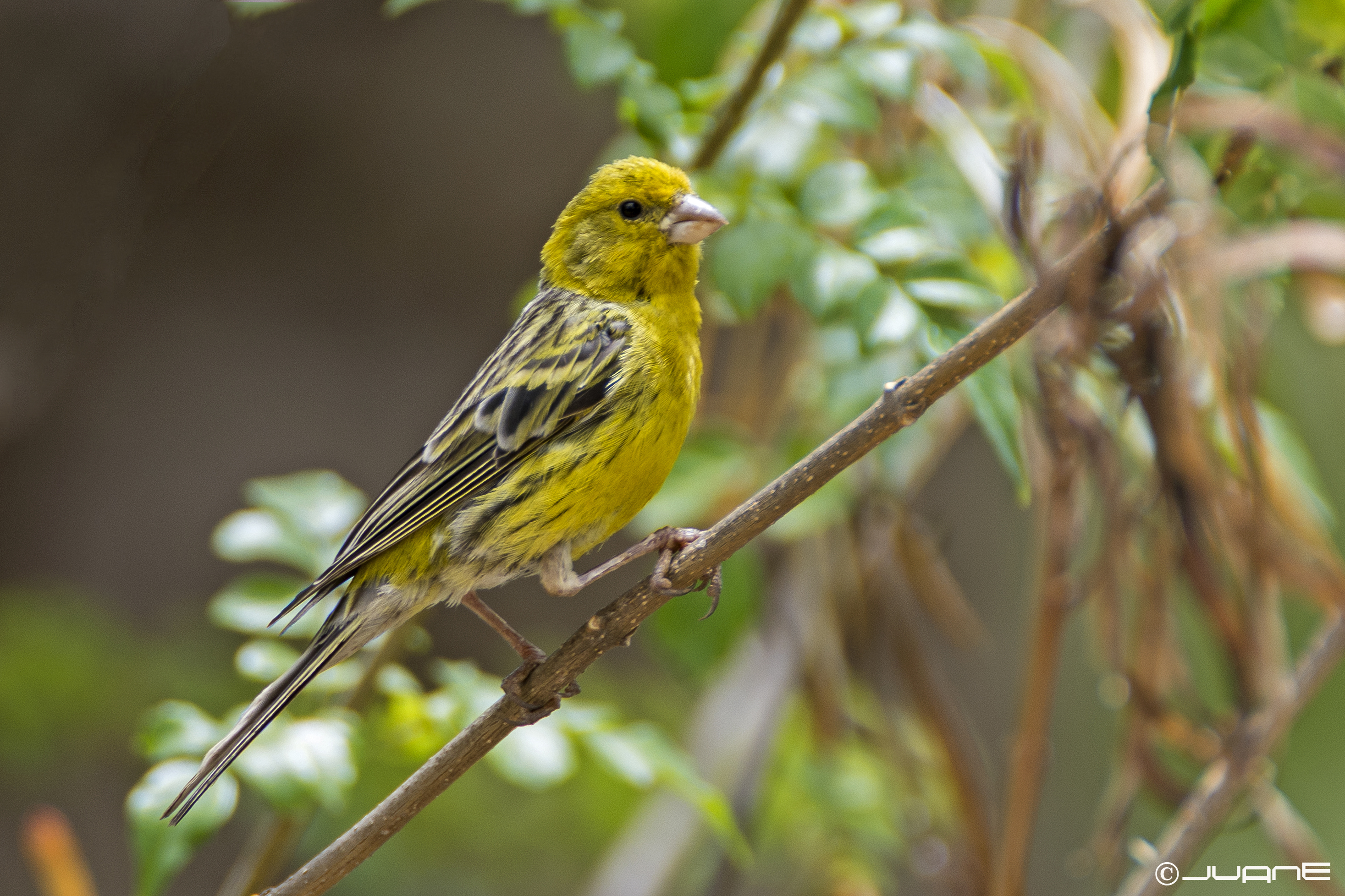 Sigma 120-300 f2.8 + TCx1.4